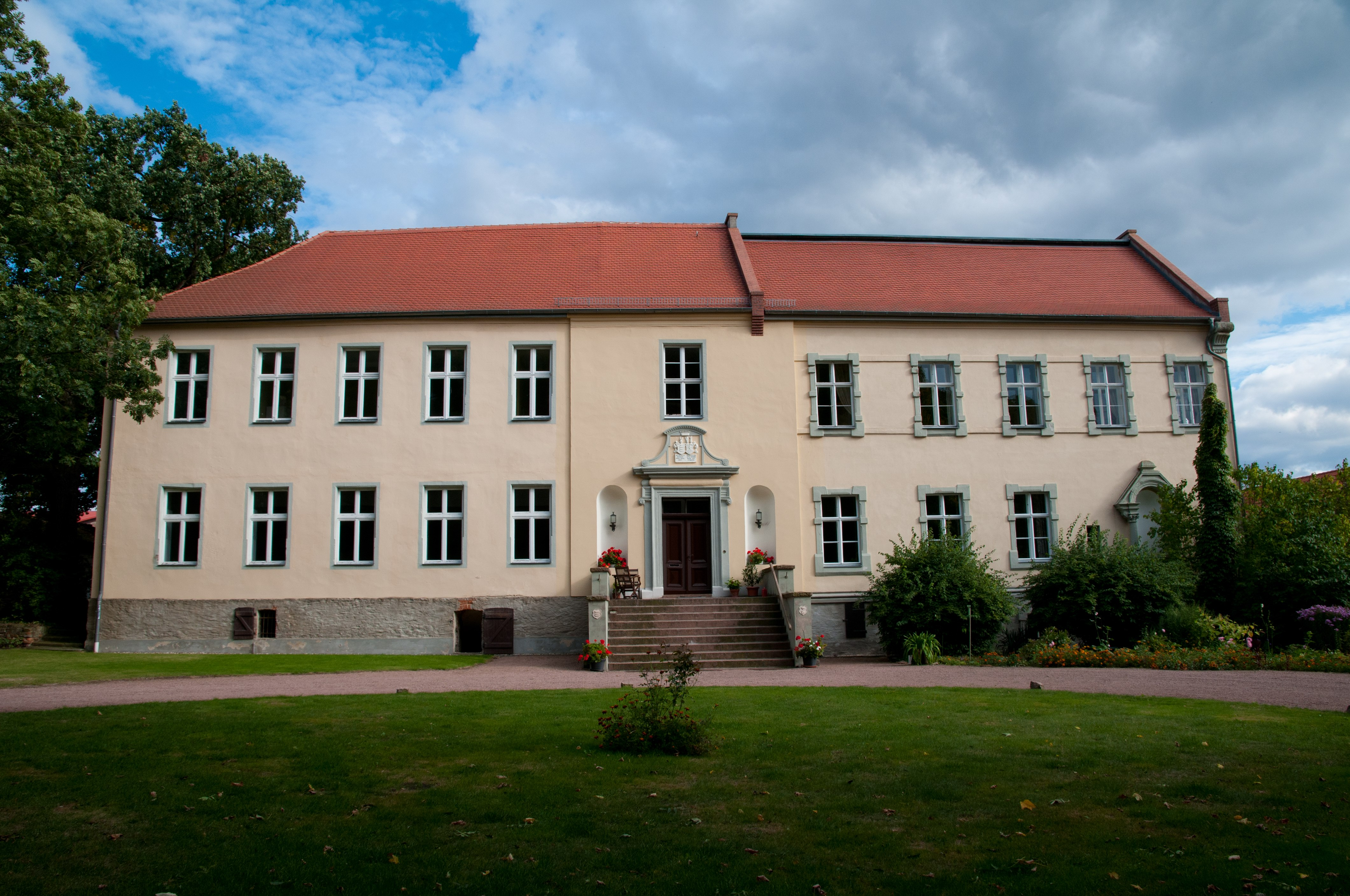 Merbitz Gutshaus (Sachsen Anhalt, Deutschland)